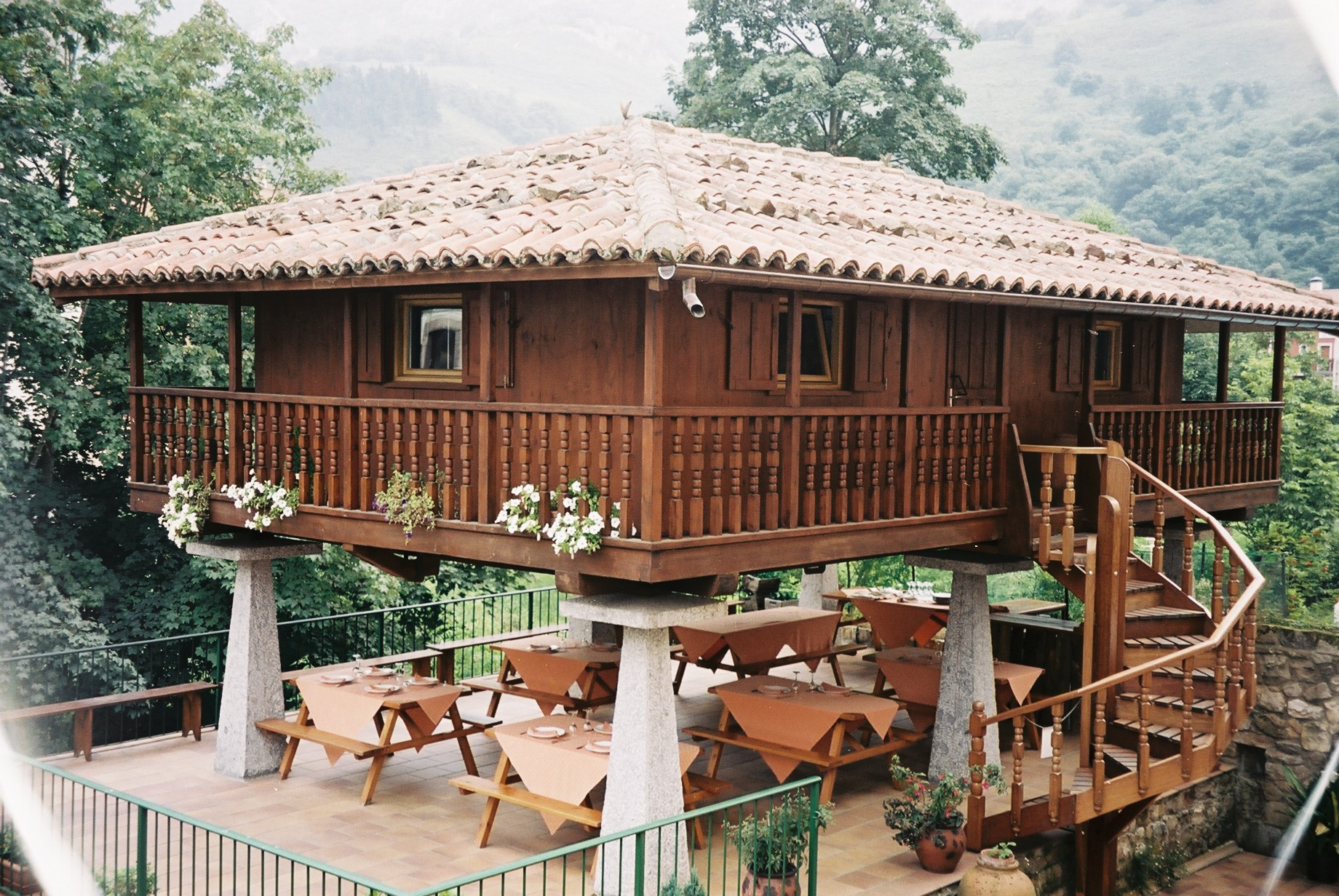 Las Arenas (Cabrales). Asturias.